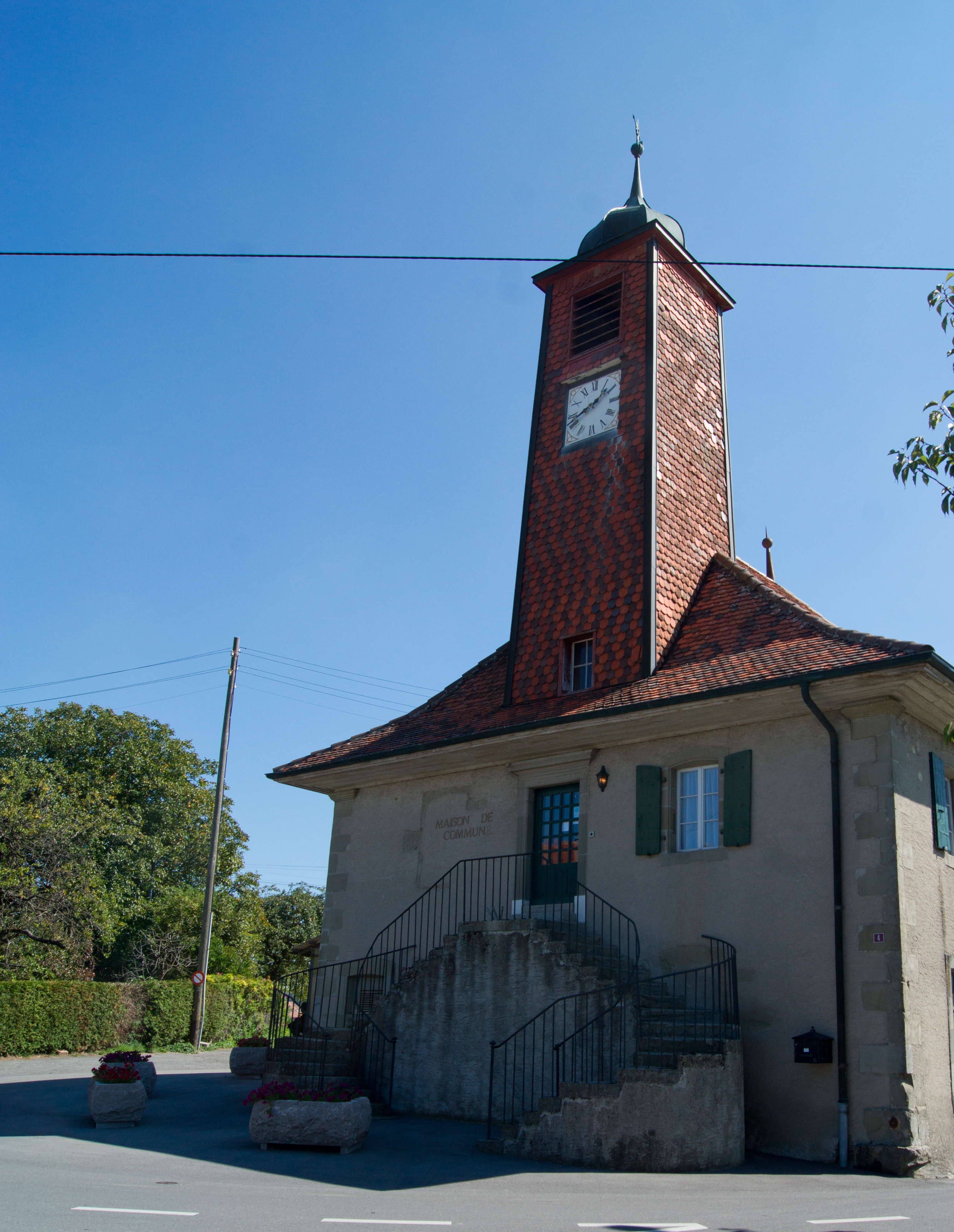 Maison de commune de Bottens, Suisse.